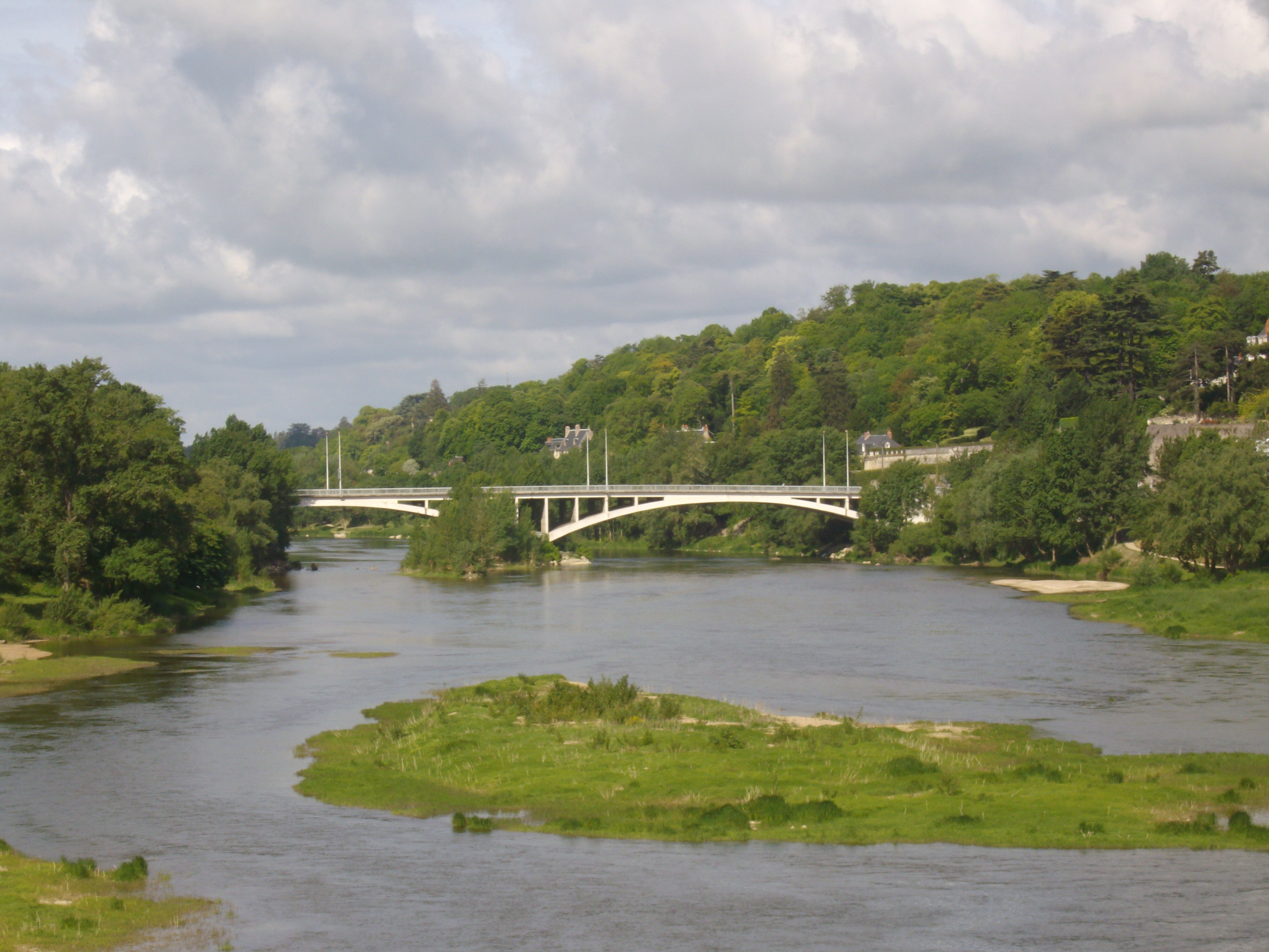 La Loire sous le pont Napoléon à Tours.